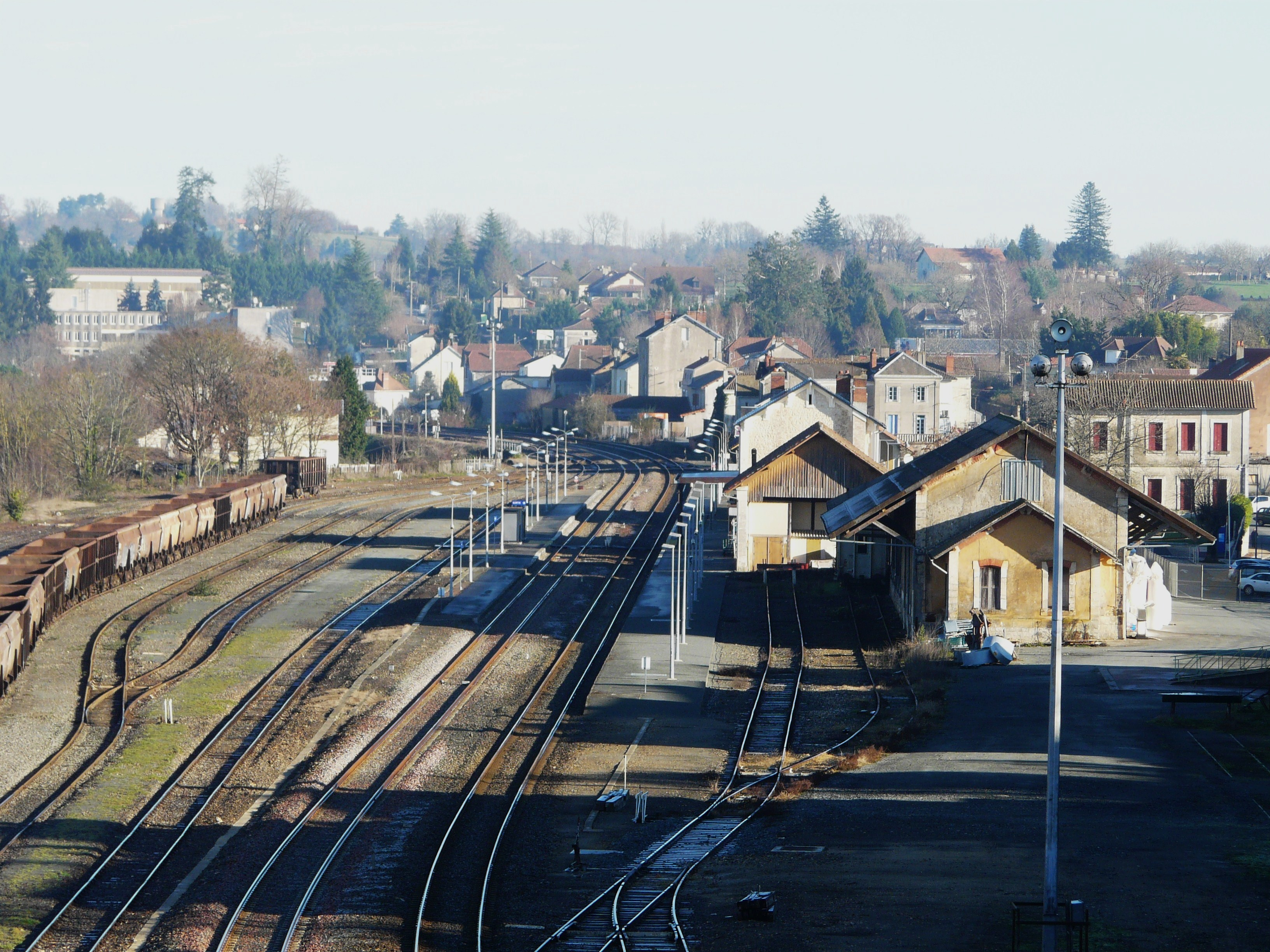 Les voies ferrées à la gare de Thiviers, Dordogne, France.